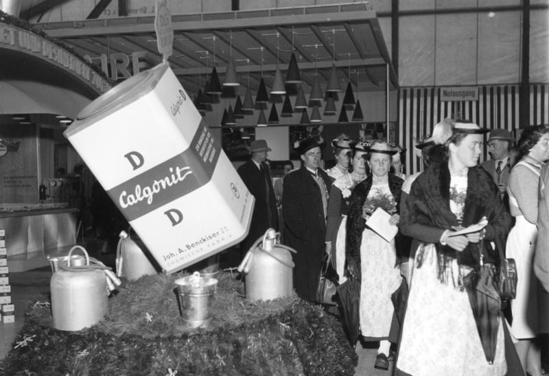 Landwirtschaftsausstellung der DLG, München, Mai 1955 Der Nachwuchsförderung dient ein dichtes Netz von Landwirtschaftsschulen